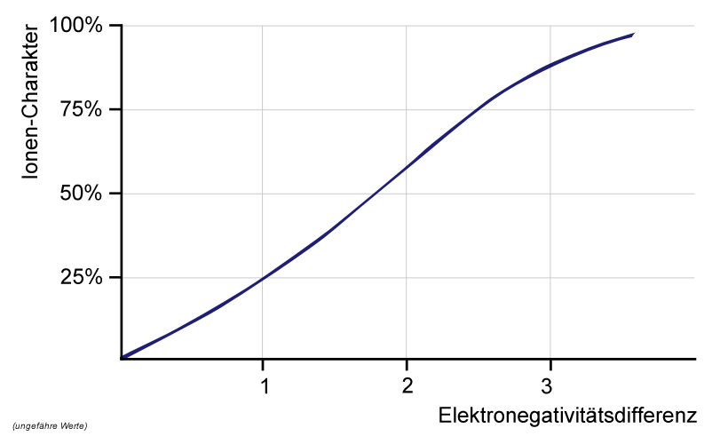 Auftragung des prozentualen Ionenbindungsanteils gegen die Elektronendifferenz